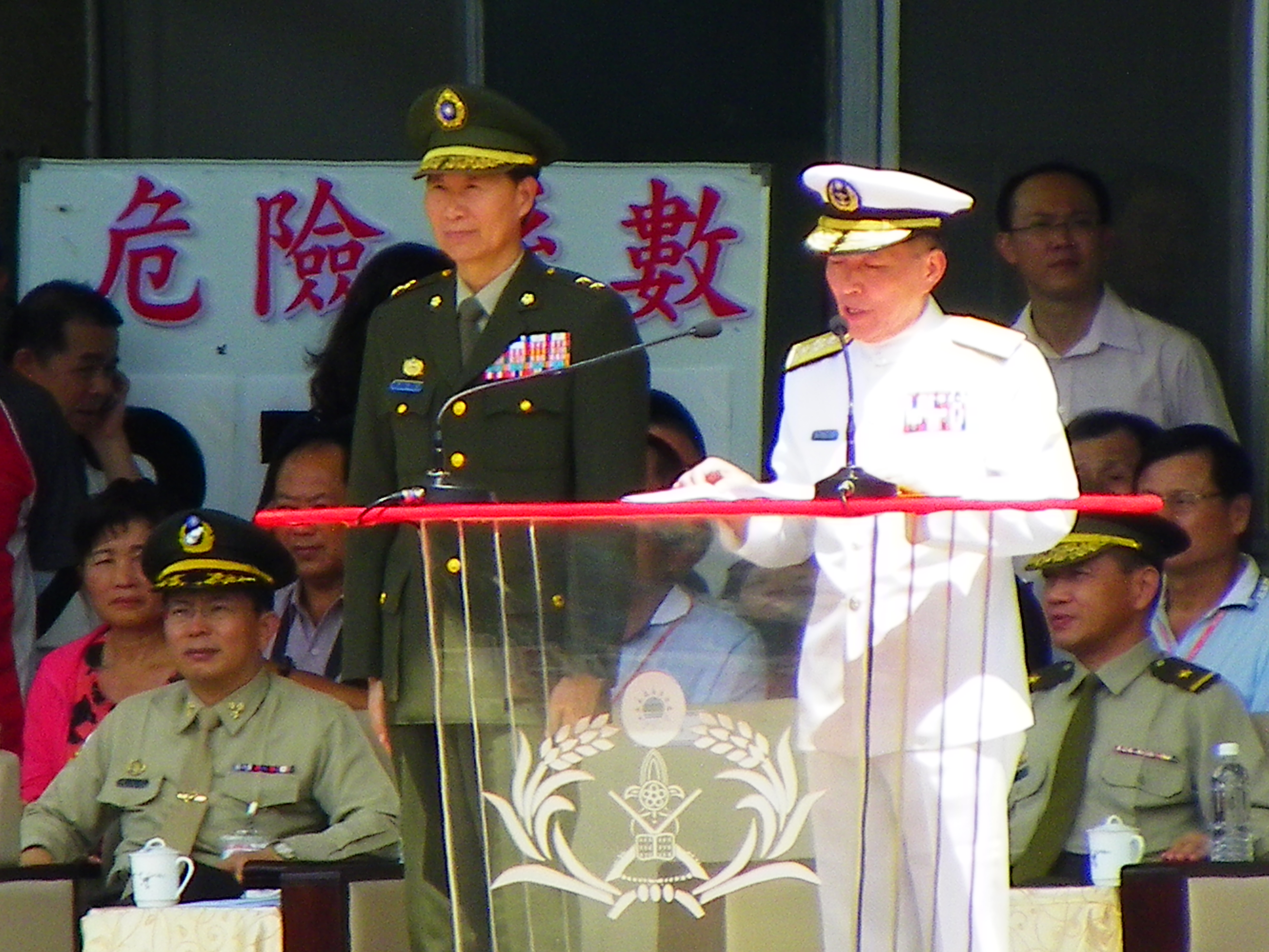 2012年憲兵學校龜山校區營區開放操演告一段落，主校官國防部軍備副部長高廣圻海軍上將（前排右）致辭，憲兵司令吳應平中將（前排左）肅立在旁。